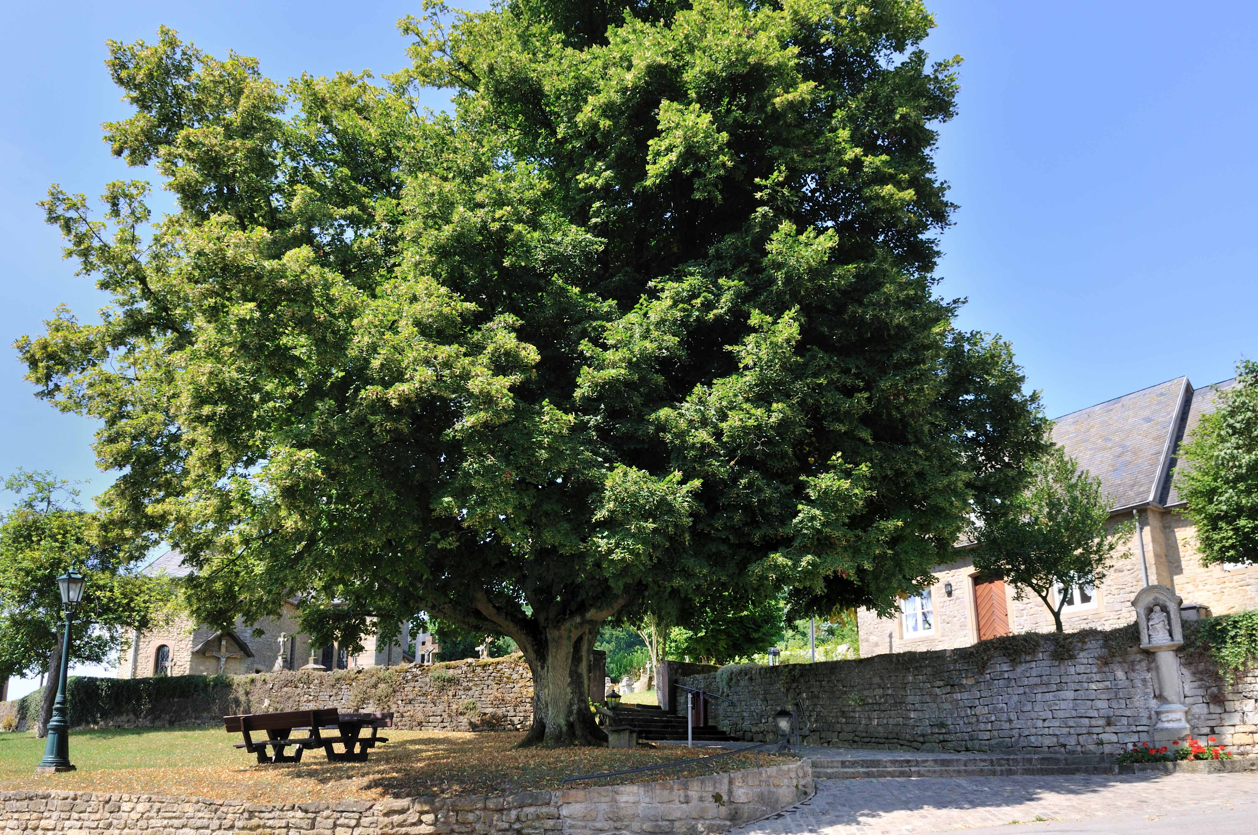 Bemierkenswäert Lann op der Giischterklaus.